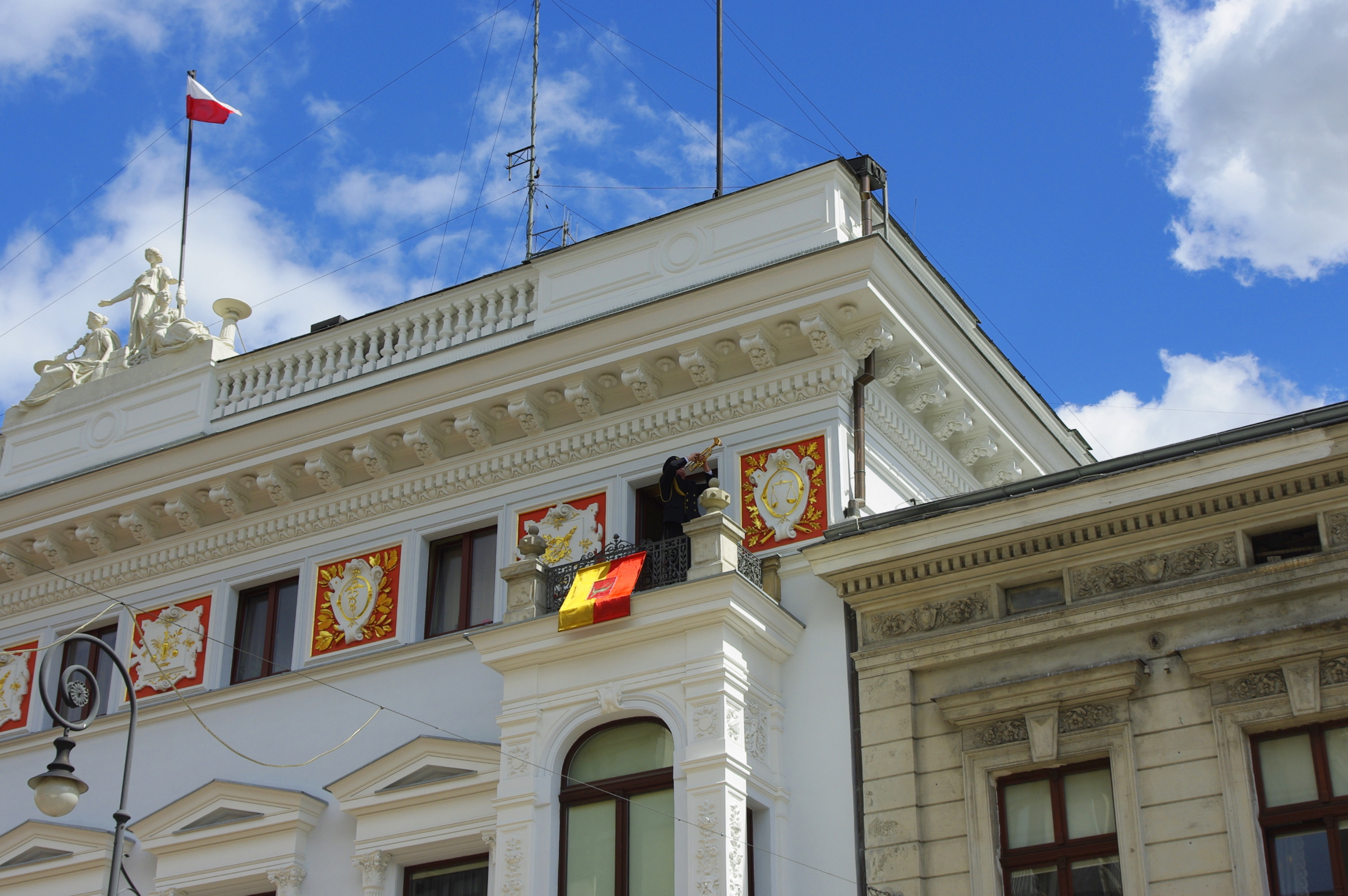 Hejnalista w Łodzi - ul. Piotrkowska 104